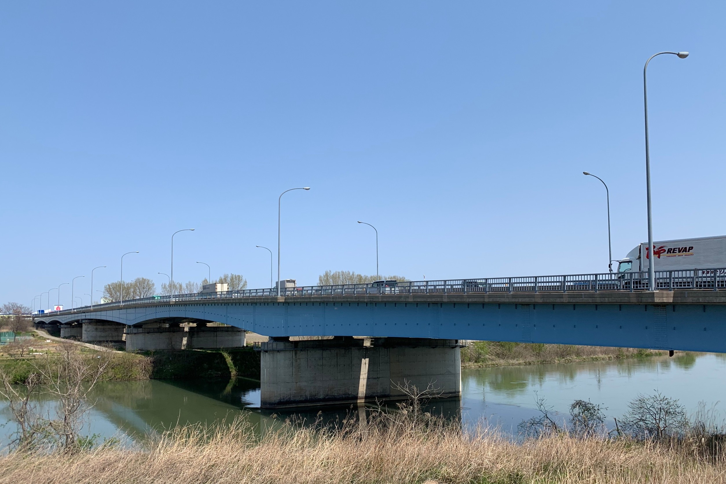 国道8号・三条大橋（2020年4月）